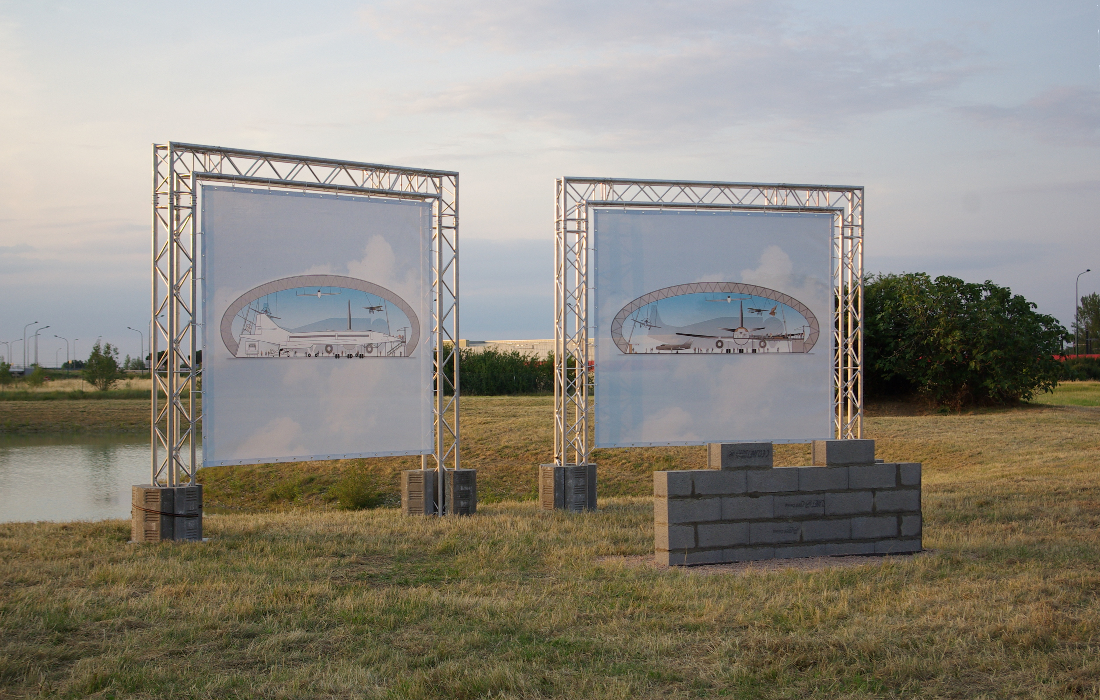 Site d'Aeroscopia lors de la pose de la première pierre.